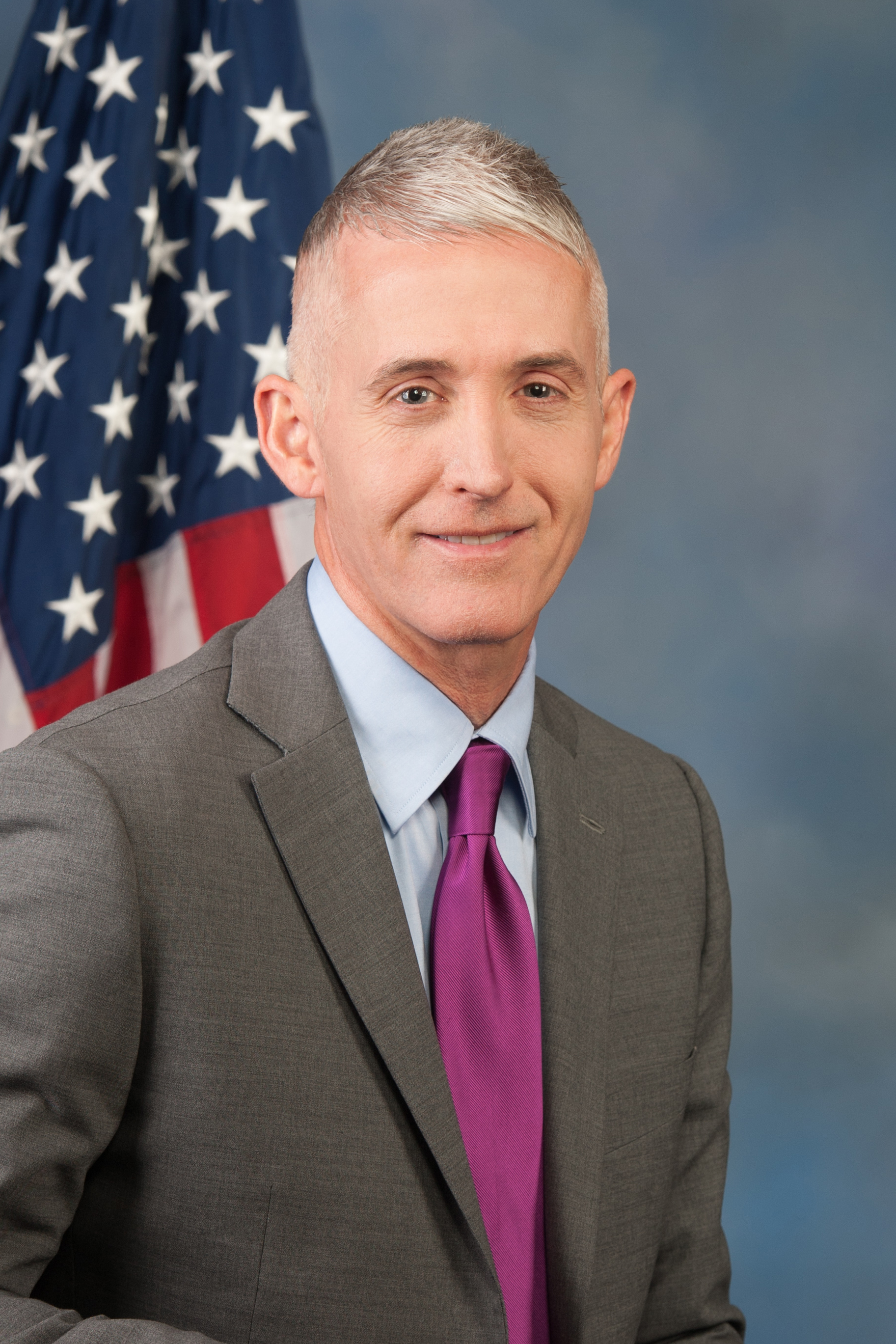 Trey Gowdy official photo, 2016